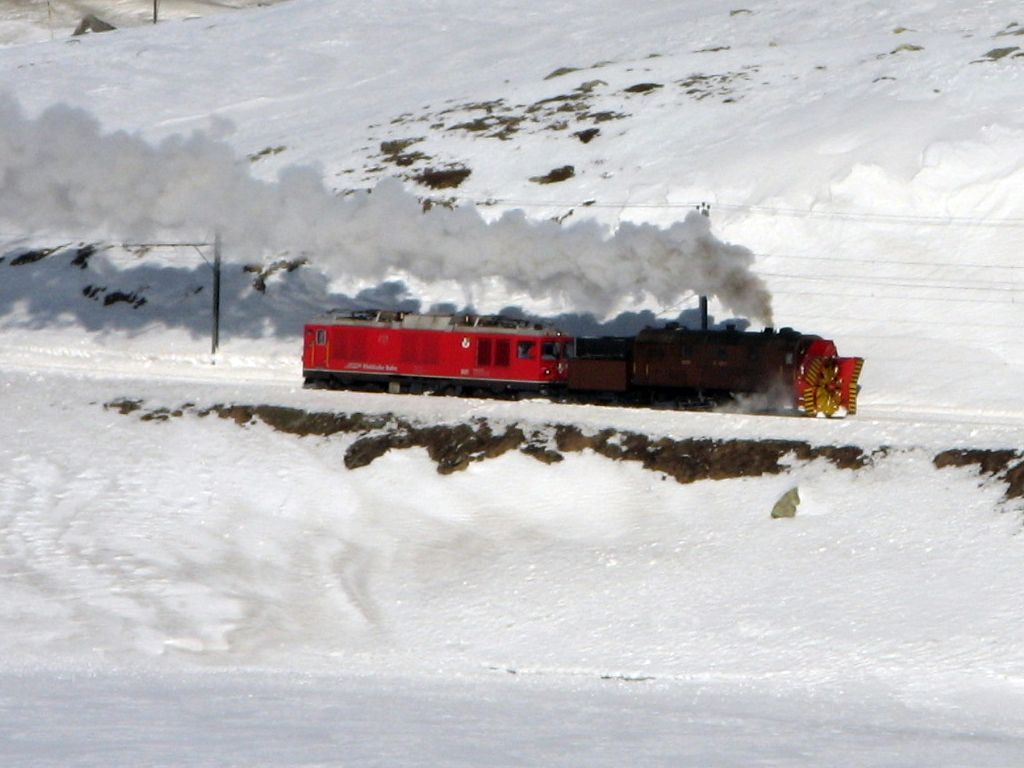 Dampfschneeschleuder Xrotd 9213 und Zweikraftlokomotive Gem 4/4 801 der Rhätischen Bahn am Berninapass